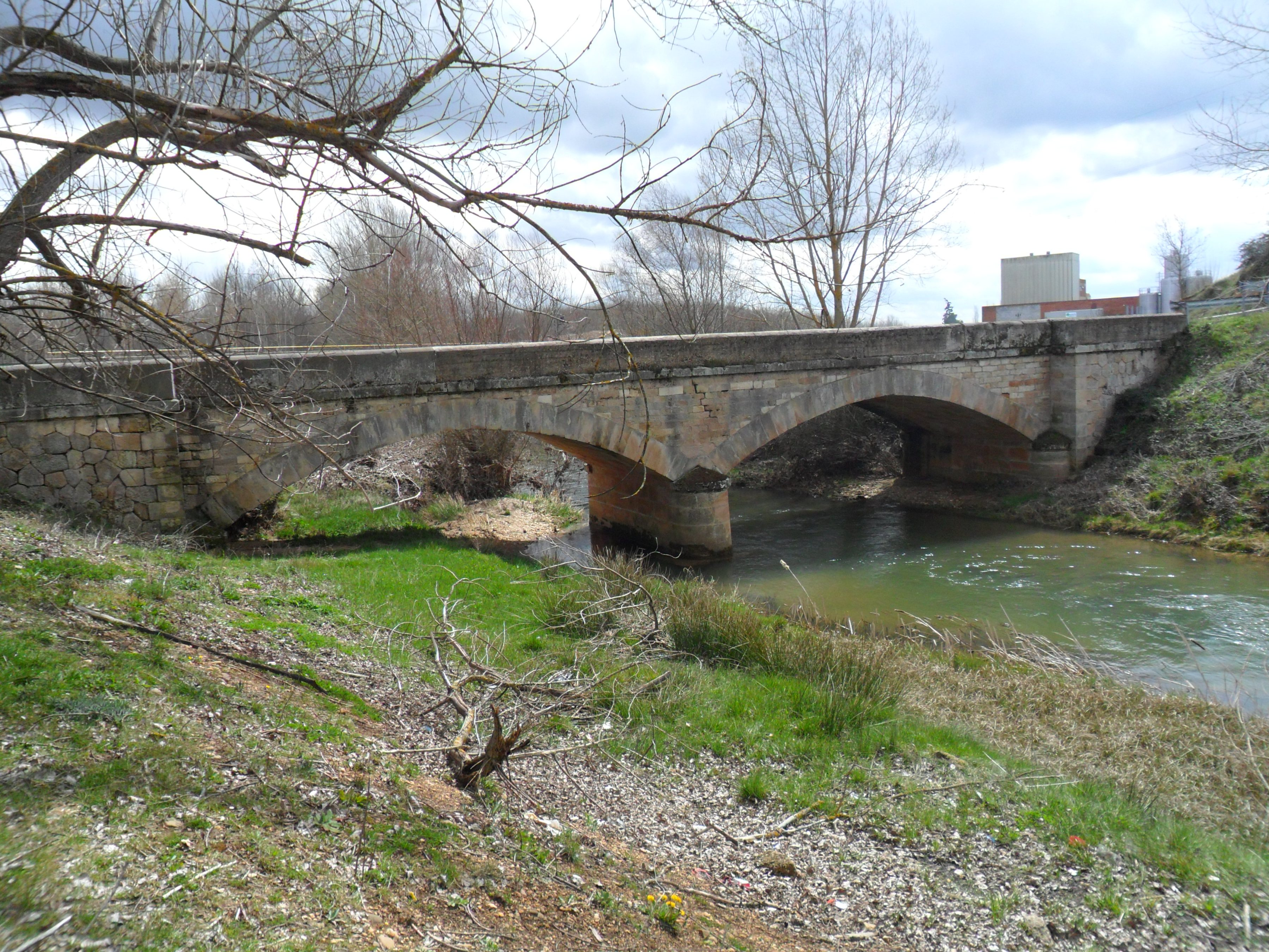 Puente sobre el río Burejo.